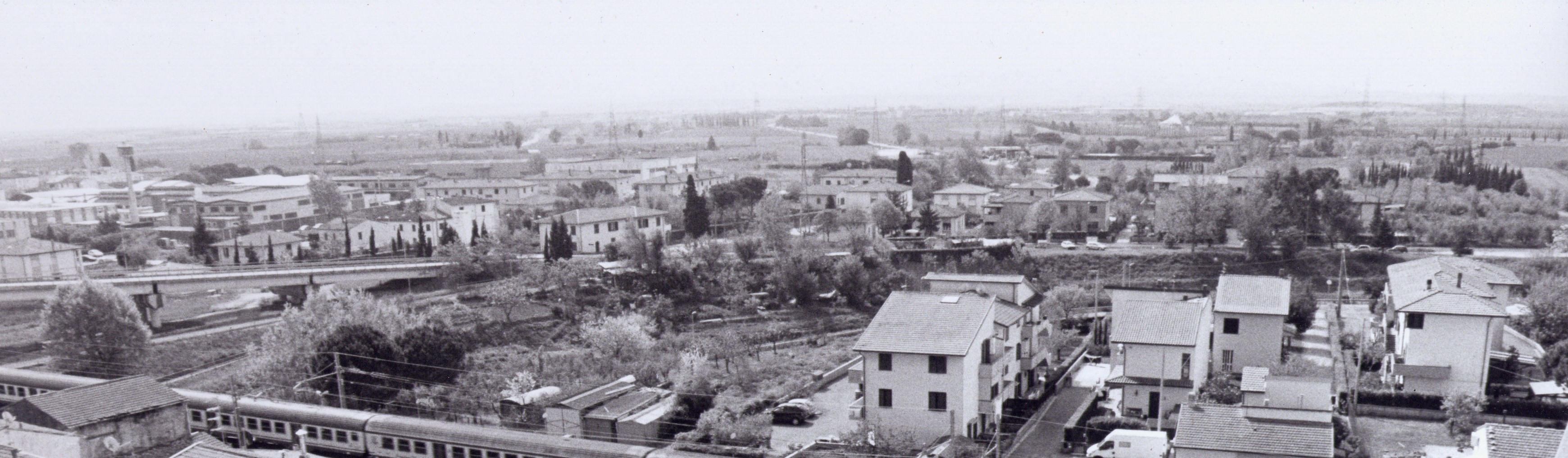 Pardossi Pontedera